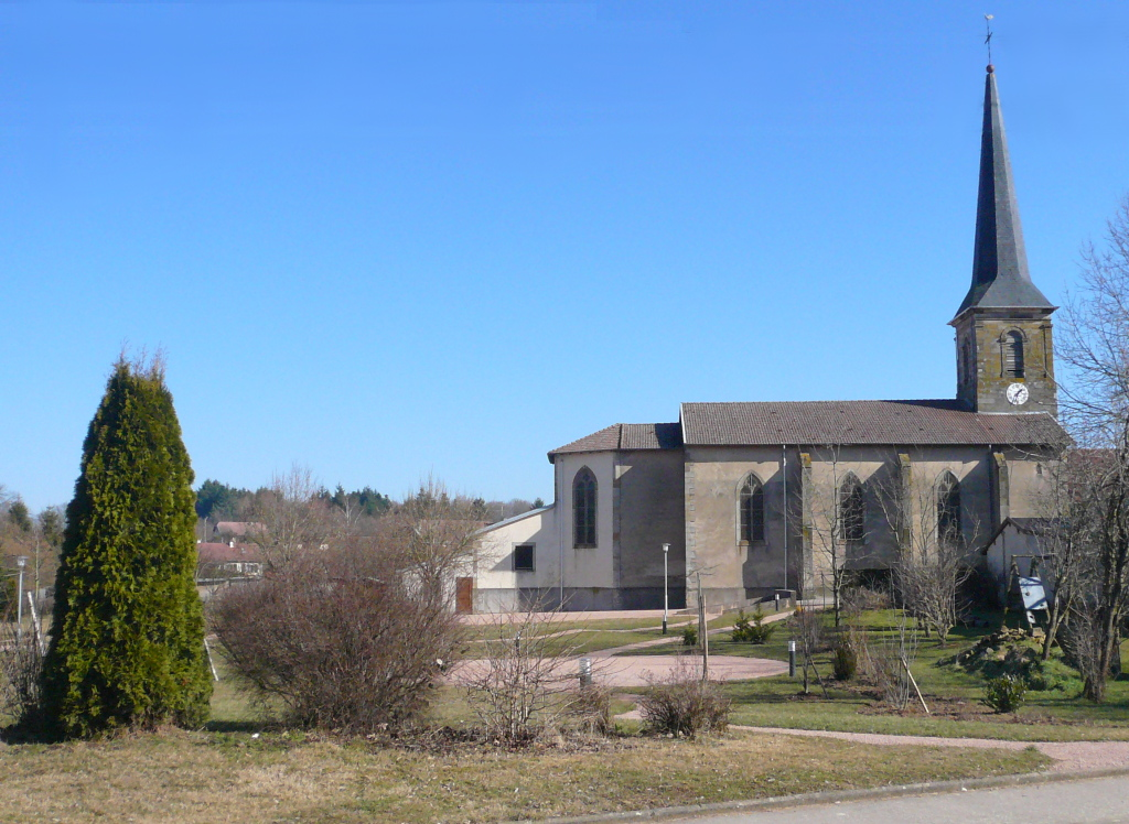 Centre du village de Méménil (Vosges)